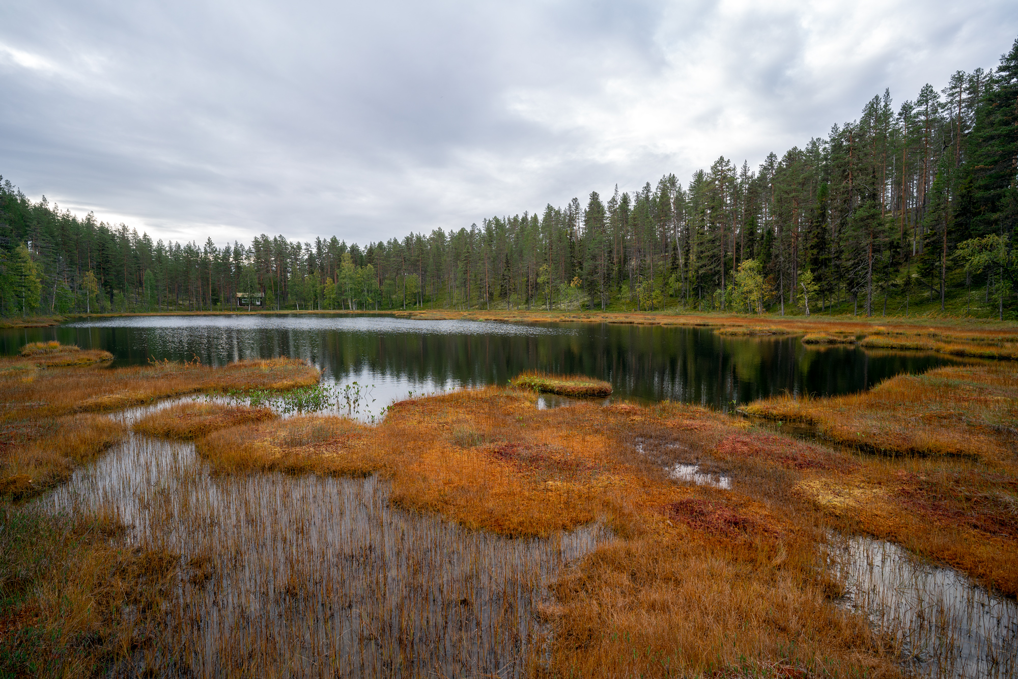 Den östra av Hornbartjärnarna.